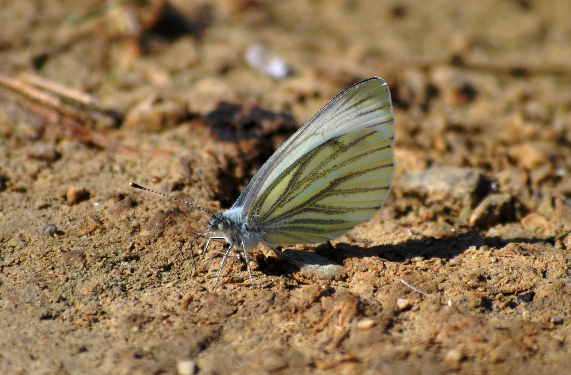 Põualibliklased on põhivärvilt valged või kollased, tiibadel on enamasti tumedat kirja. Naeriliblikas on hõlpsasti äratuntav tumedalt tolmunud tagatiibade alakülje soonte järgi. Emase eestiival on kaks musta tähni.